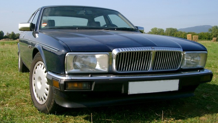 Daimler XJ40 (1988) 3,6l